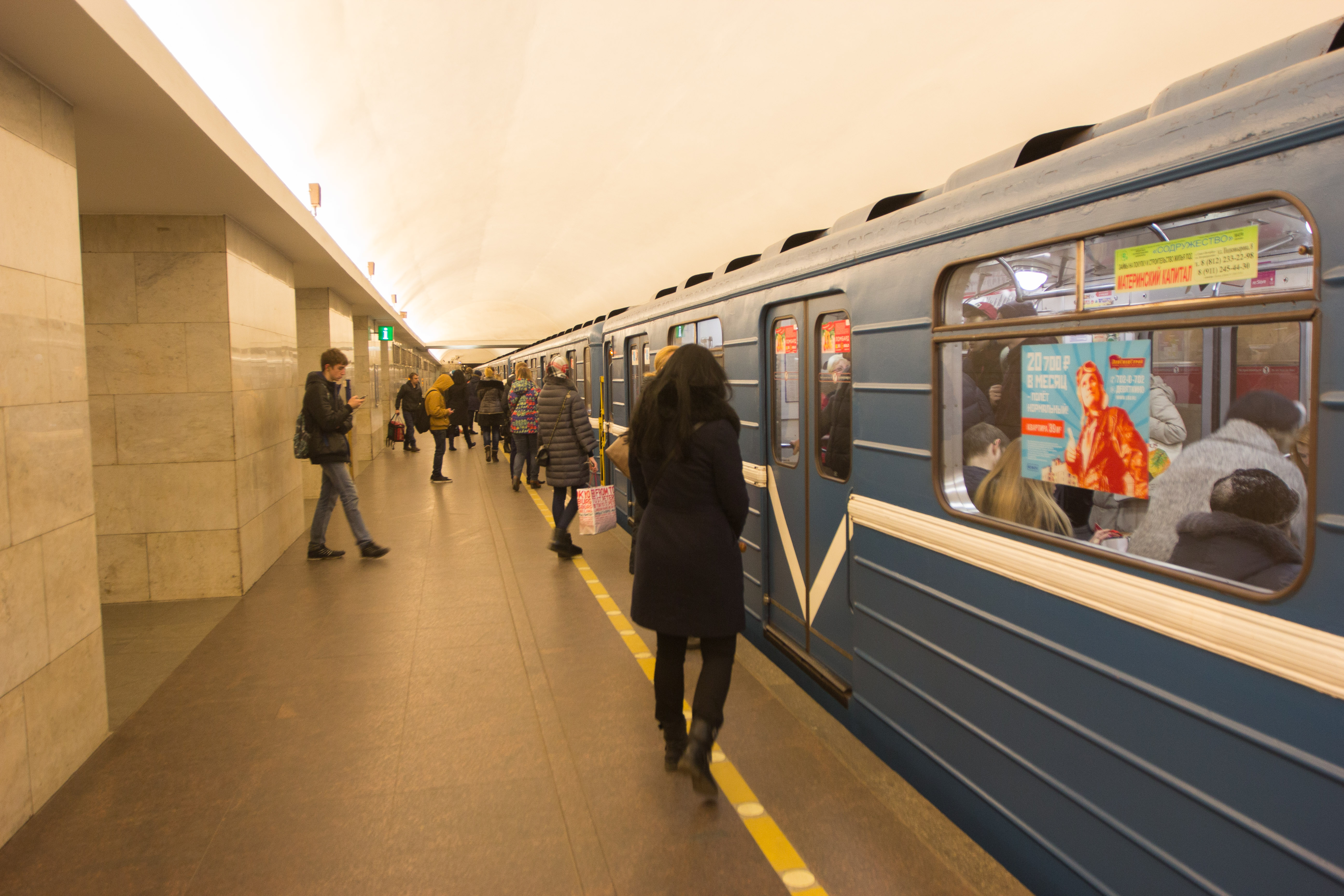 Vue de la station de métro Technologichesky (Lignes 1 et 2) du métro de Saint-Pétersbourg (Russie)